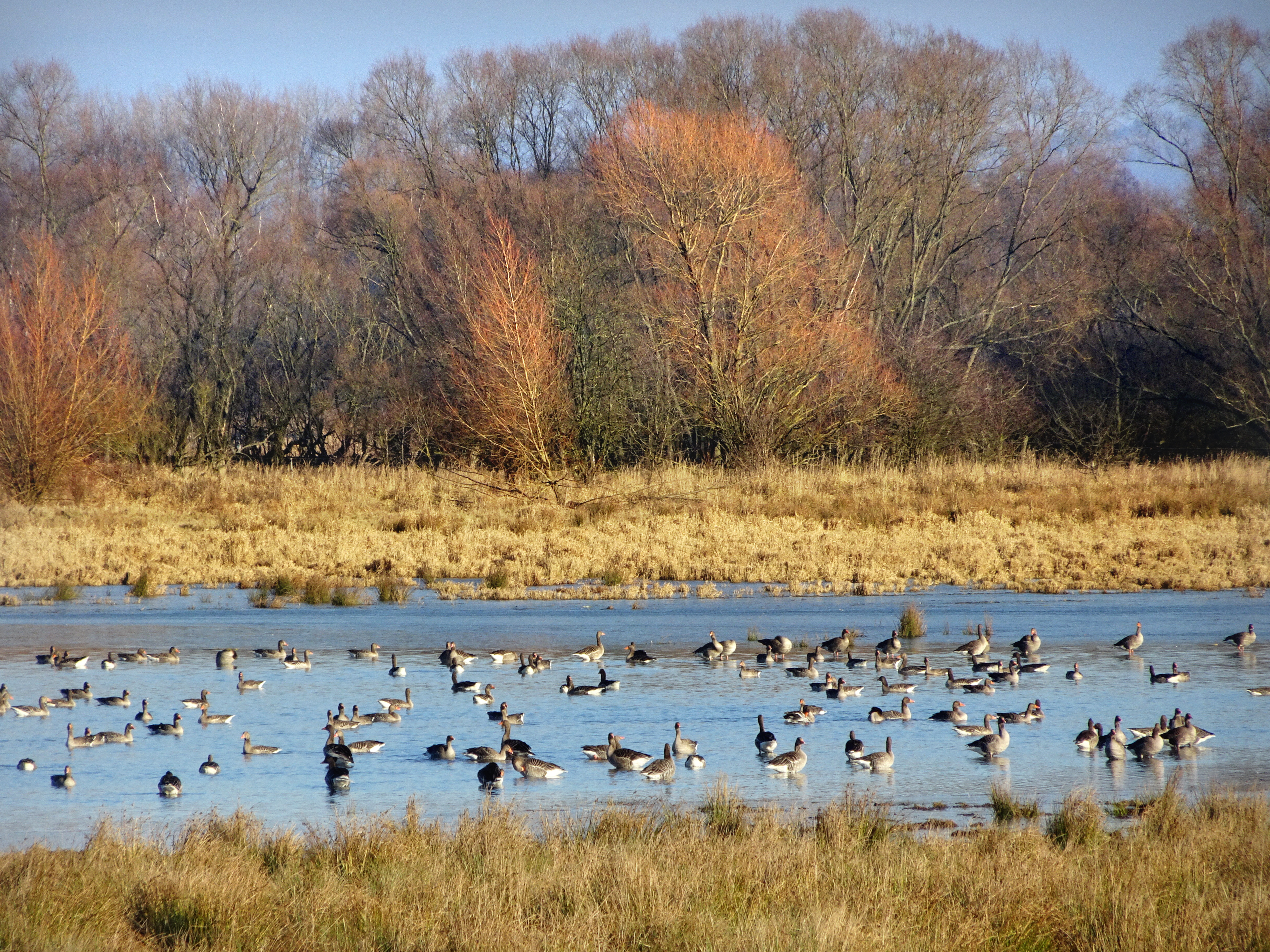 Graugänse (Anser anser) im Naturschutzgebiet „Dankmarshäuser Rhäden“ im thüringischen Wartburgkreis. Der Bereich gehört auch zum FFH-Gebiet DE-5026-305 „Dankmarshäuser Rhäden“ und zum EU-Vogelschutzgebiet DE-5127-401 „Werra-Aue zwischen Breitungen und Creuzburg“.